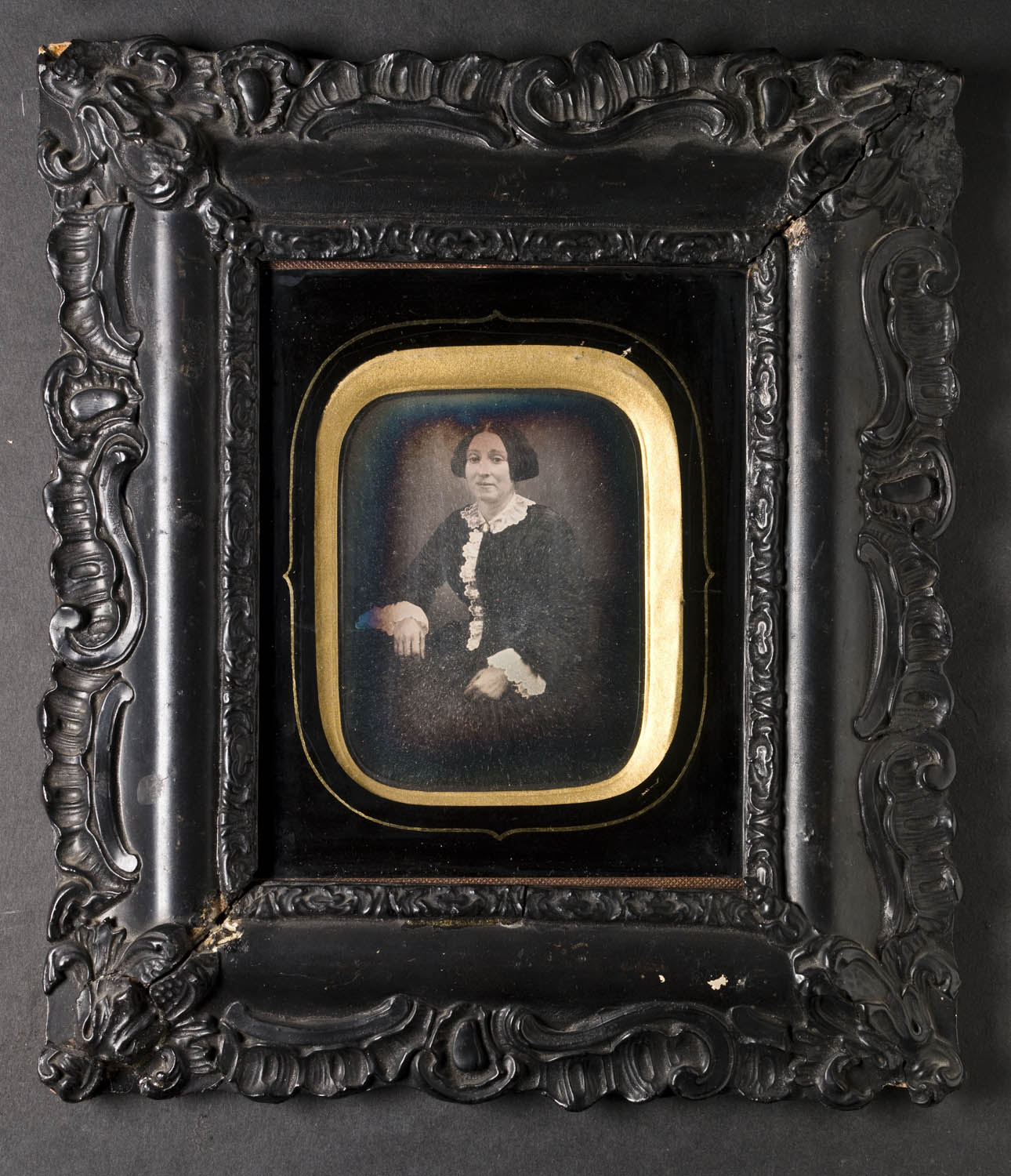 Daguerreotypier, 2 st; porträtt av herre och dam, okända medlemmar av släkten Bergström; ramar av trä och gips, ornament i nyrokoko, svartlackerade; svarta ripsband att hänga i; ramarna lätt skadade. Ram H 24,8 cm, Br 21,6 cm. Inv.nr. 27057a-b. Dagerrotyp / daguerreotyp. A: Dagerrotyp i ram, porträtt av okänd man, sittande knästycke, trekvartsprofil. Mörkt hår kammat i snedbena, blicken mot fotografen. Iklädd enkelknäppt långrock, vit skjorta med hög stärkt krage och svart halsduk. Lutar vä. arm mot litet bord, höger arm vilar på höger ben. Dagerrotypen inom rektangulärt stående dagöppning med rundade hörn och bred guldkant på skrå närmast dagöppningen. Svart passepartout målad direkt på täckglaset, liksom smal guldrand nära dagöppningen. Dagerrotypen med infattning inramad i bred svart ram av trä och gips med nyrokokornament, se ovan. Baksida av blått papper. Upphängningsögla av svart textilband fäst i ramen med rött vax. Dagerrotypen något oxiderad runt ytterkanterna. Papperet på baksidan trasigt, dagerrotypens originalinramning i dagen. B: Dagerrotyp i ram, porträtt av okänd kvinna, sittande knästycke, trekvartsprofil. Mörkt hår kammat i mittbena, uppsatt. Iklädd mörk klänning med vit spets i krage, vertikalt längs knappraden mitt framtill och i manschetter. Lutar sin hö. arm mot stöd [bord?) vänster arm med knuten hand vilar i knät. Dagerrotypen inom rektangulärt stående dagöppning med rundade hörn och bred guldkant på skrå närmast dagöppningen. Svart passepartout målad direkt på täckglaset, liksom smal guldrand nära dagöppningen. Dagerrotypen med infattning inramad i bred svart ram av trä och gips med nyrokokornament, se ovan. Baksida av gulnat papper. Upphängningsögla av svart textilband fäst i ramen med rött vax. Dagerrotypen oxiderad runt ytterkanterna. Papperet på baksidan trasigt, dagerrotypens originalinramning i dagen längs ovansidan.Textilbandets ena ände har lossnat från vaxet.